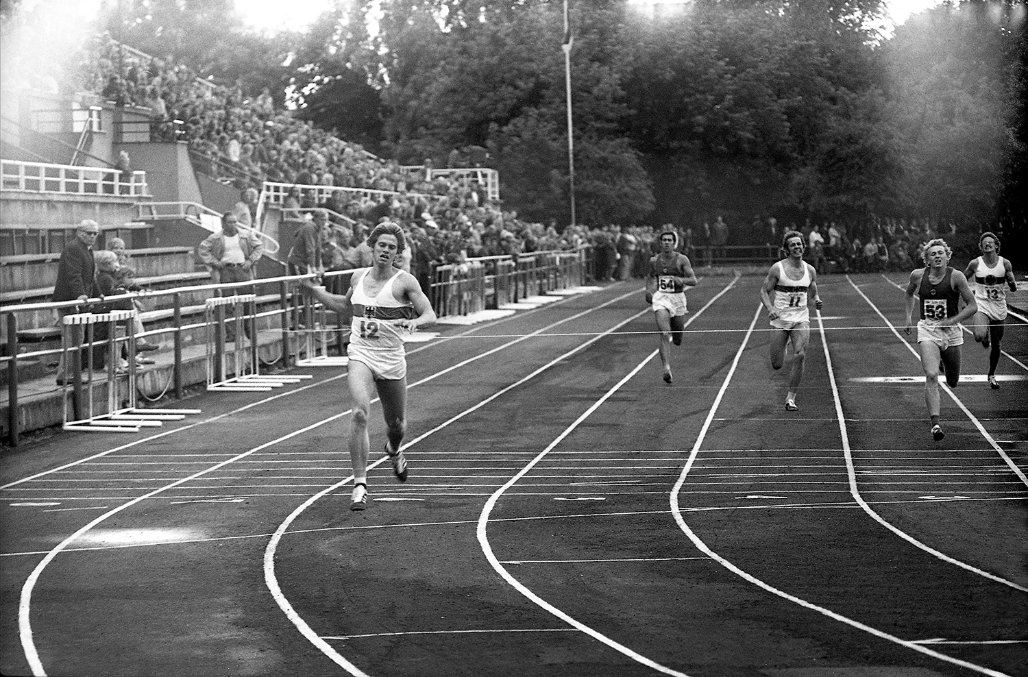 NSV Liit - USA - Saksa FV kümnevõistluses Tallinnas Kadrioru staadionil 1974 (01)